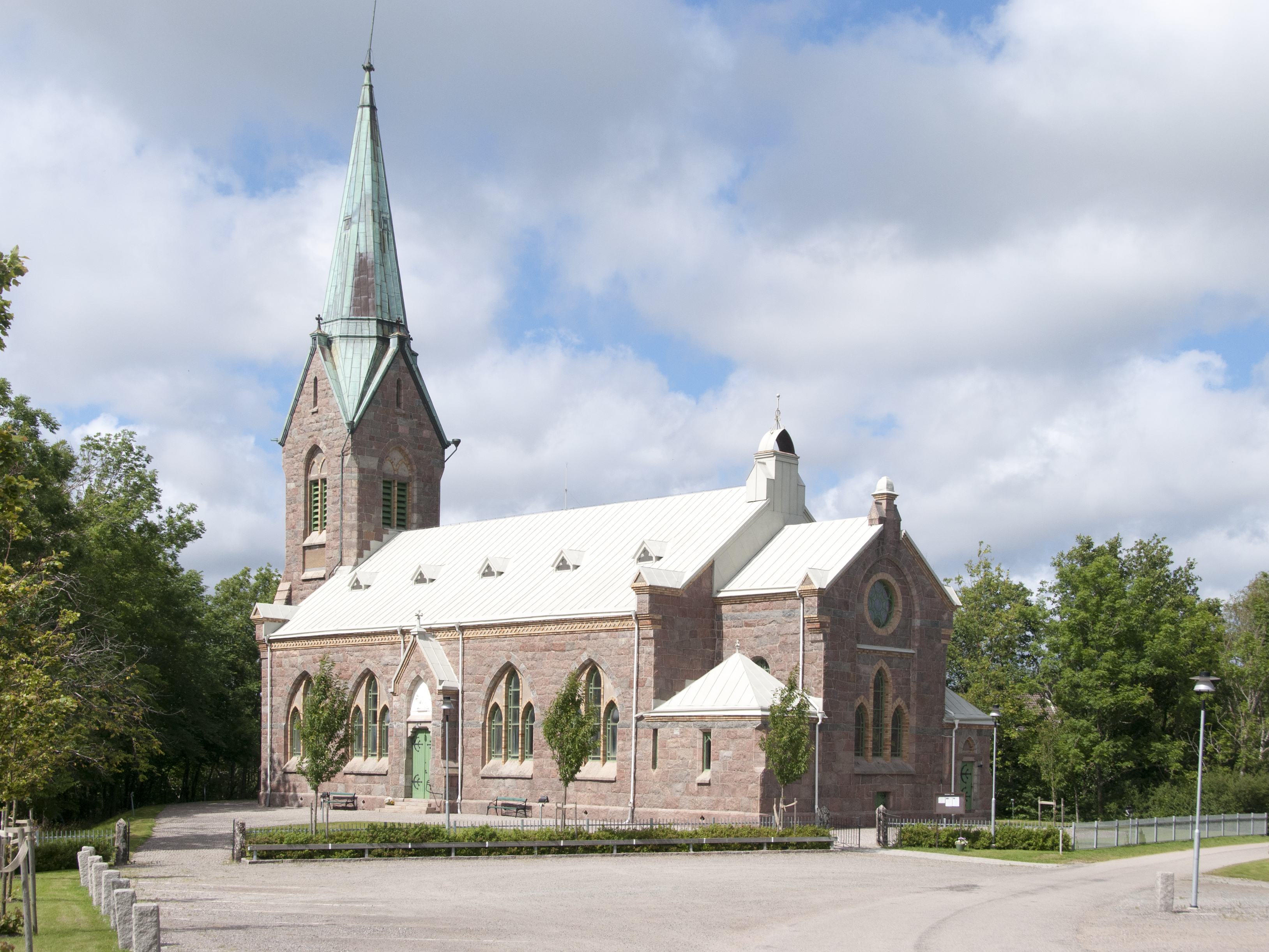 Bokenäs nya kyrka, Nybyggnadsår 1899 - 1901, Adrian Crispin Peterson (Arkitekt)